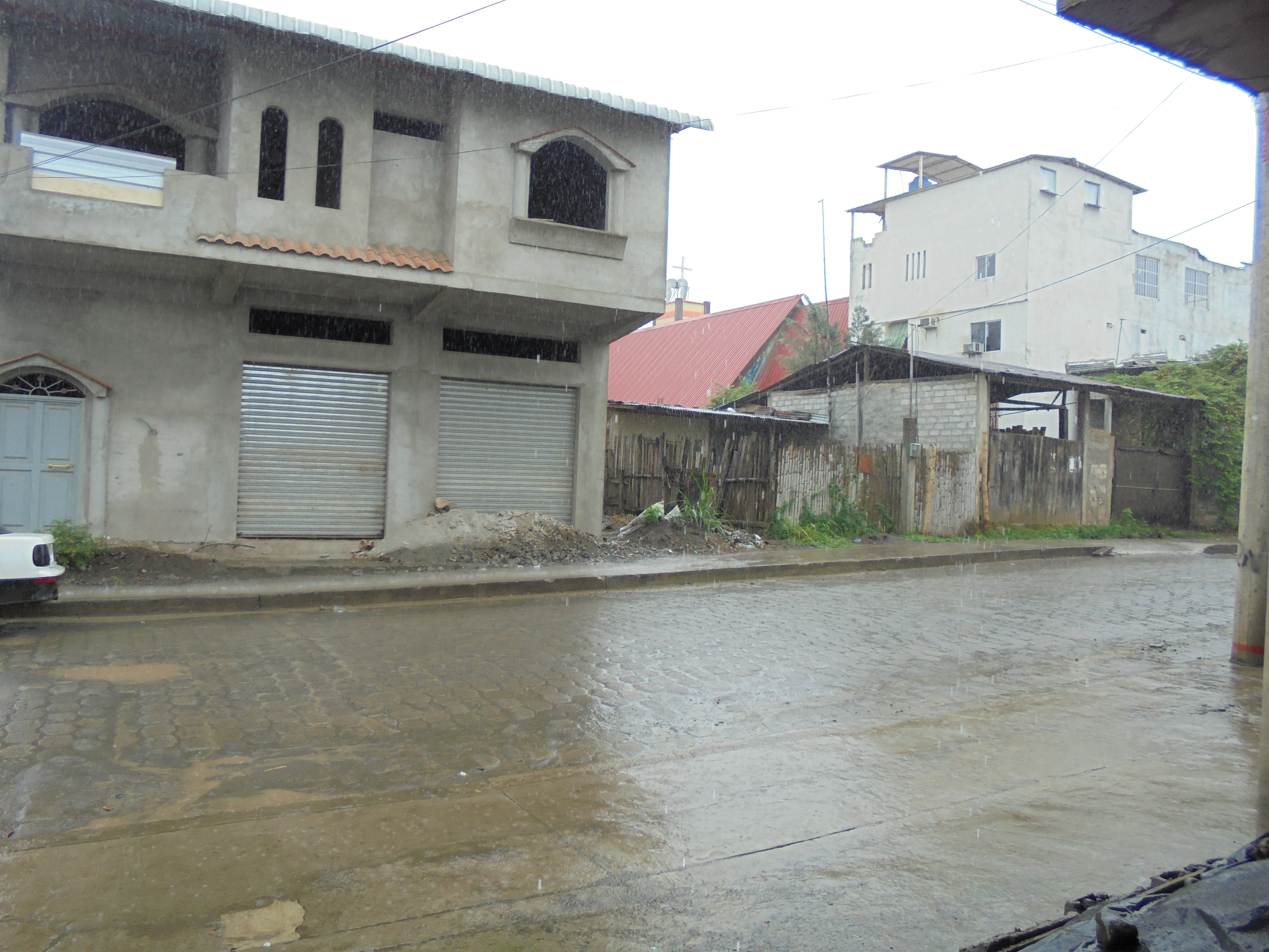 Calle Antonio José de Sucre en un dia lluvioso